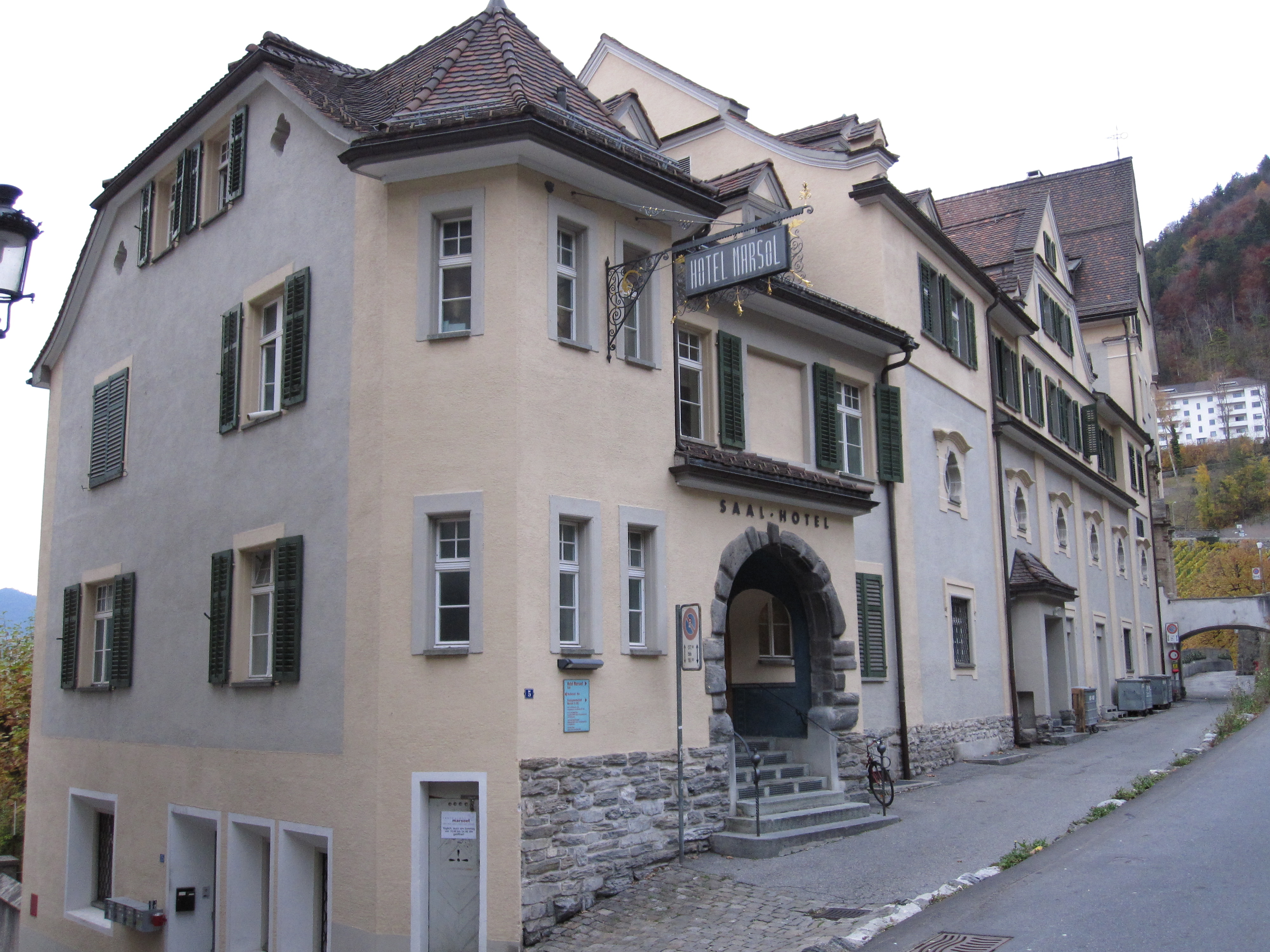 der Marsöl in Chur (Schweiz, Kanton Graubünden)